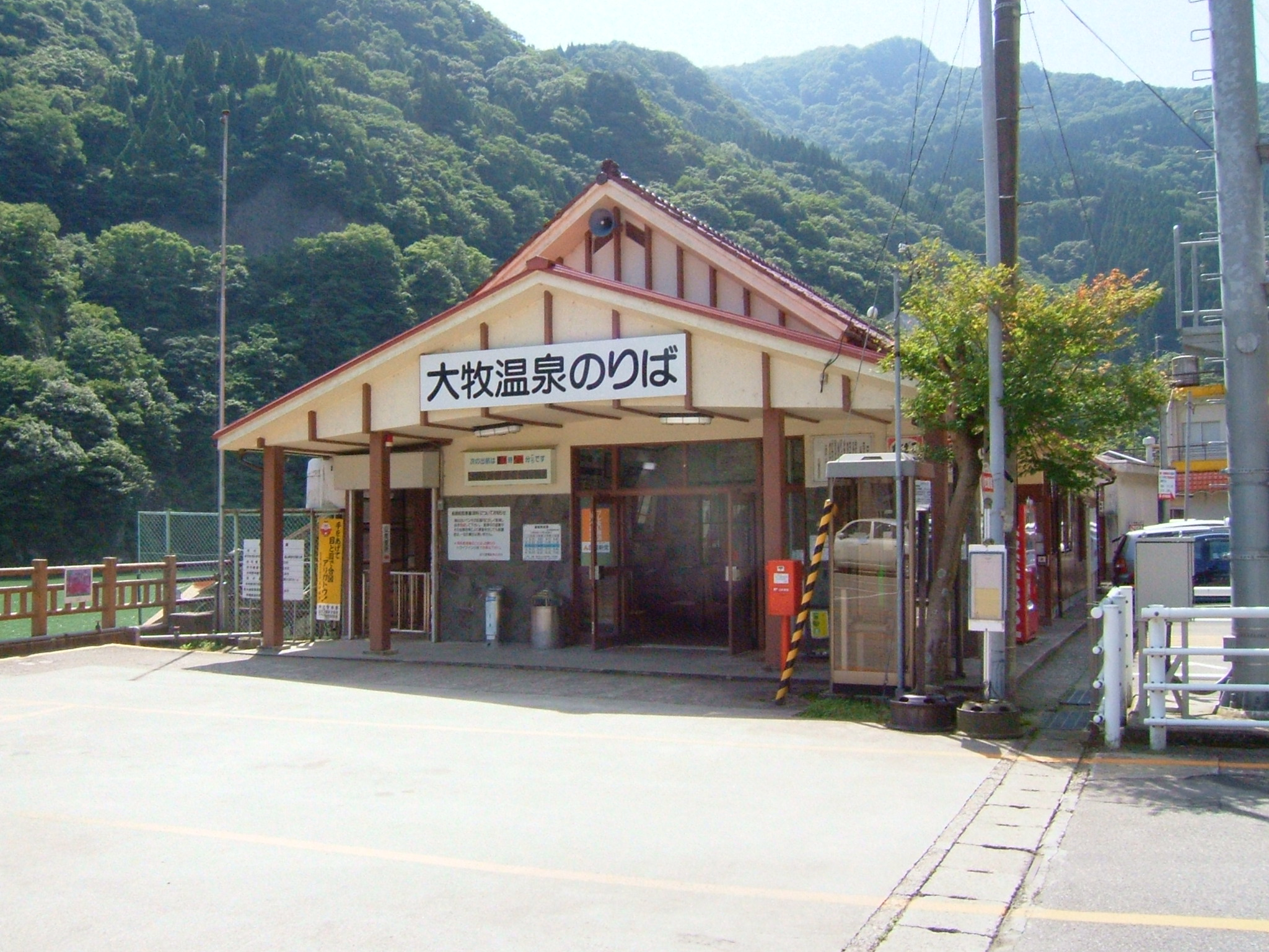 小牧ダムには大牧温泉に向かう庄川遊覧船の乗り場がある。